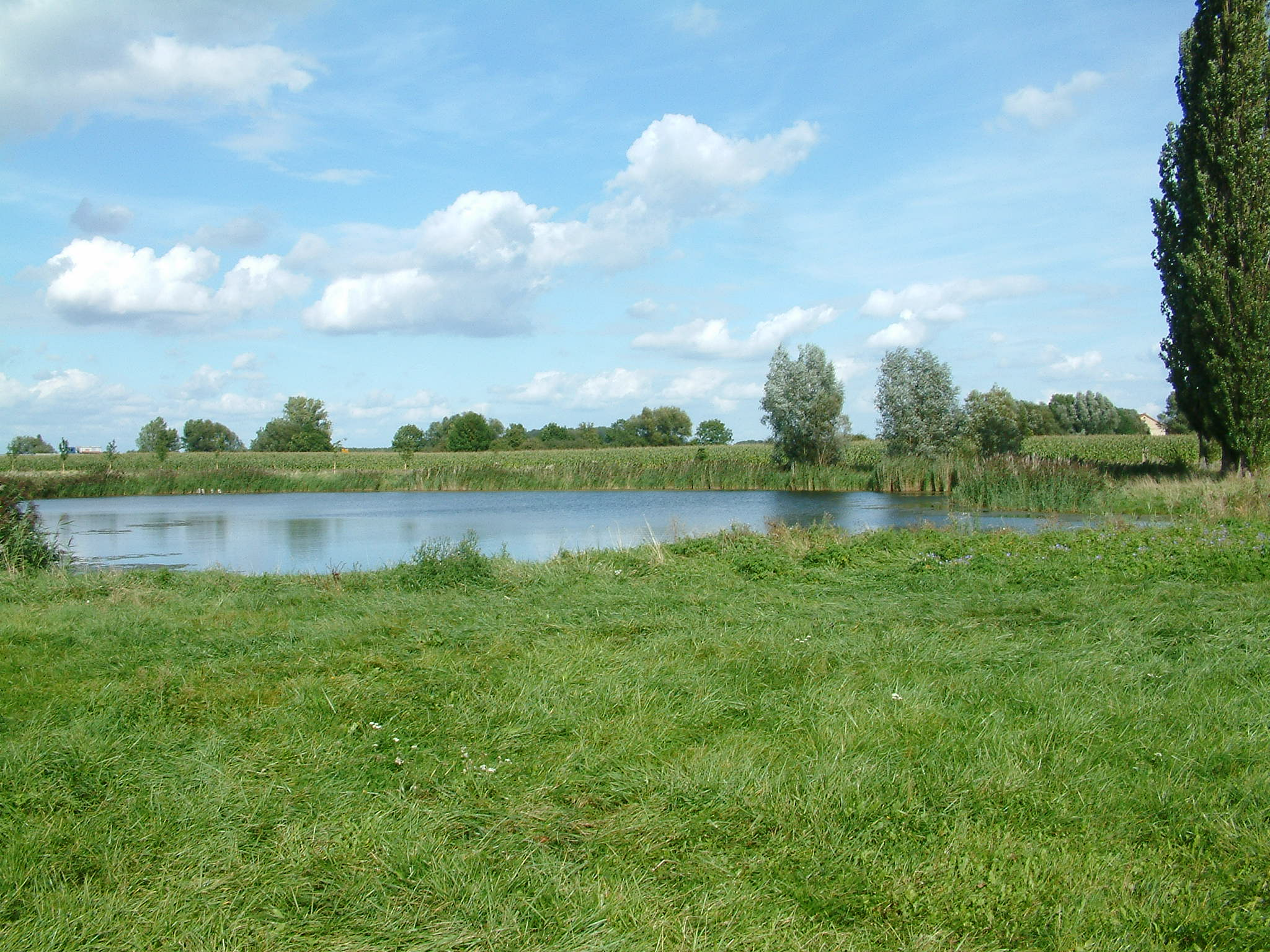 Der Faule See befindet sich am nordwestlichen Ortsrand und ist ein beliebtes Angelgewässer. Vom Ursprung her gesehen handelt es sich um einen Erdfall.